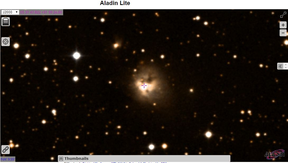 Ces images sont des captures d'écran de la région et de l'objet astronomique affichés par le programme Aladin/Lite que l'on peut utiliser à l'adresse suivante : Le lien dans le texte de la légende permet d'accéder à Aladin Lite et à l'image interactive de l'objet.